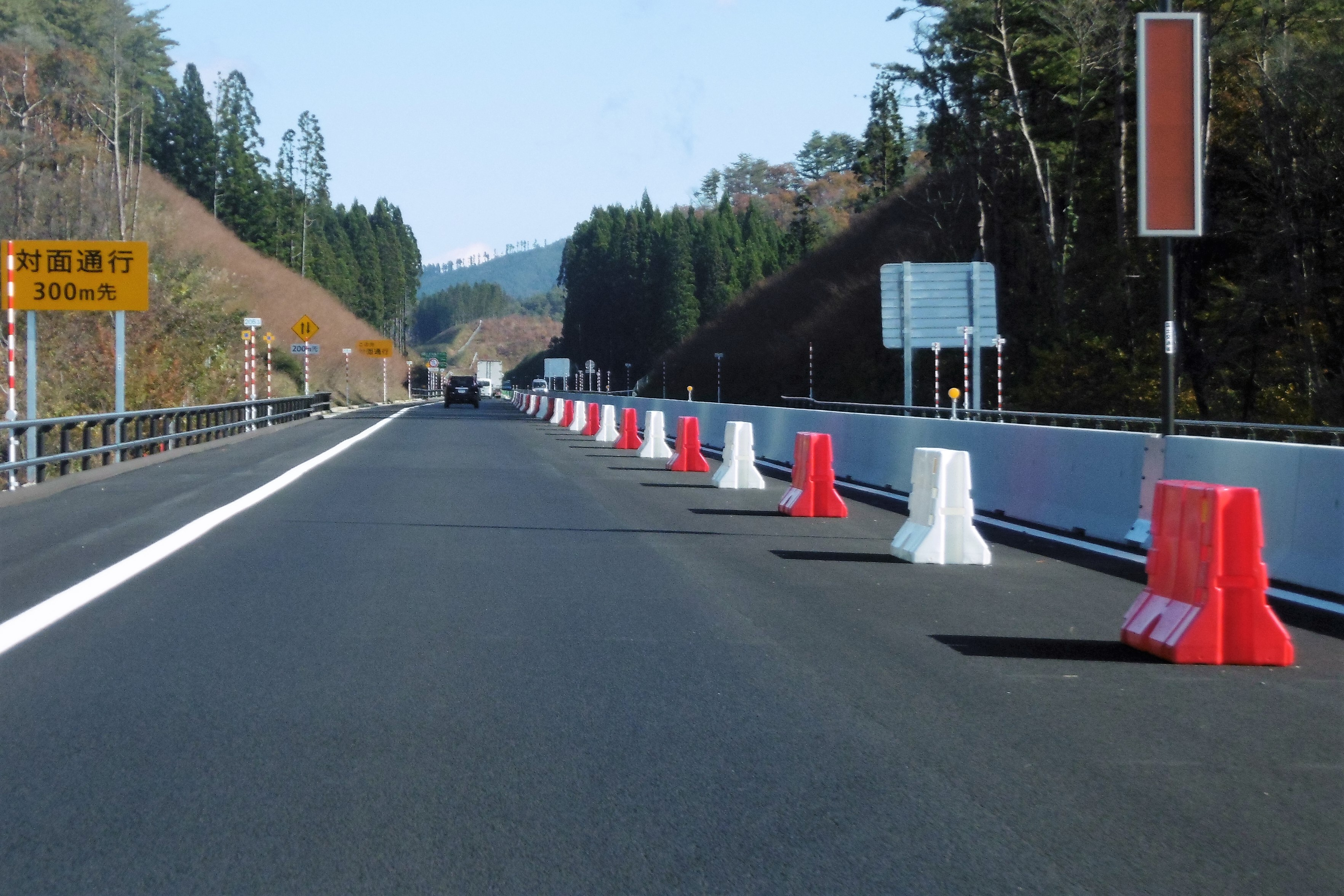 鷹巣インターチェンジ